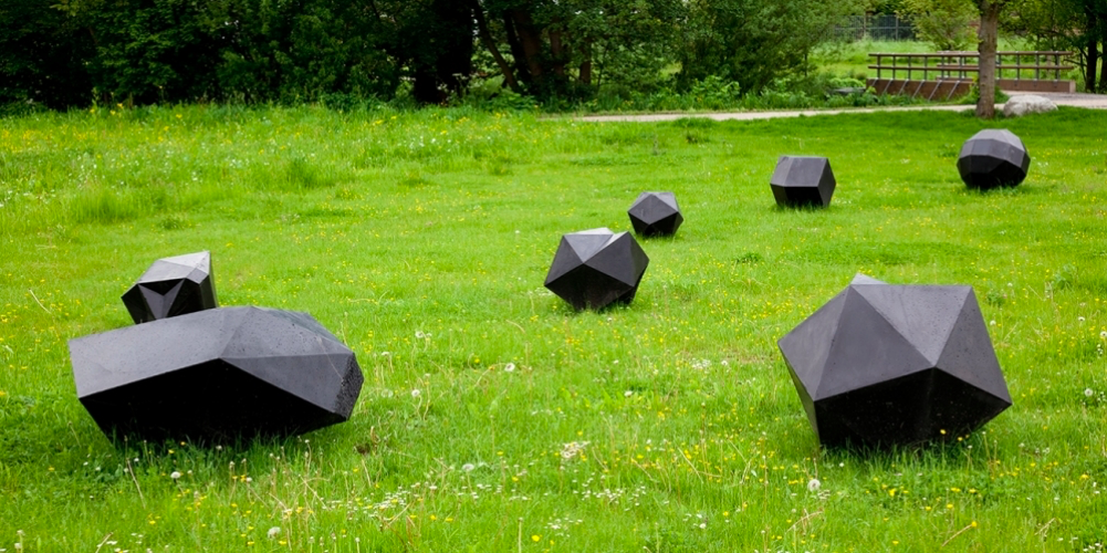 Plastik in der Biennale "Blickachsen"